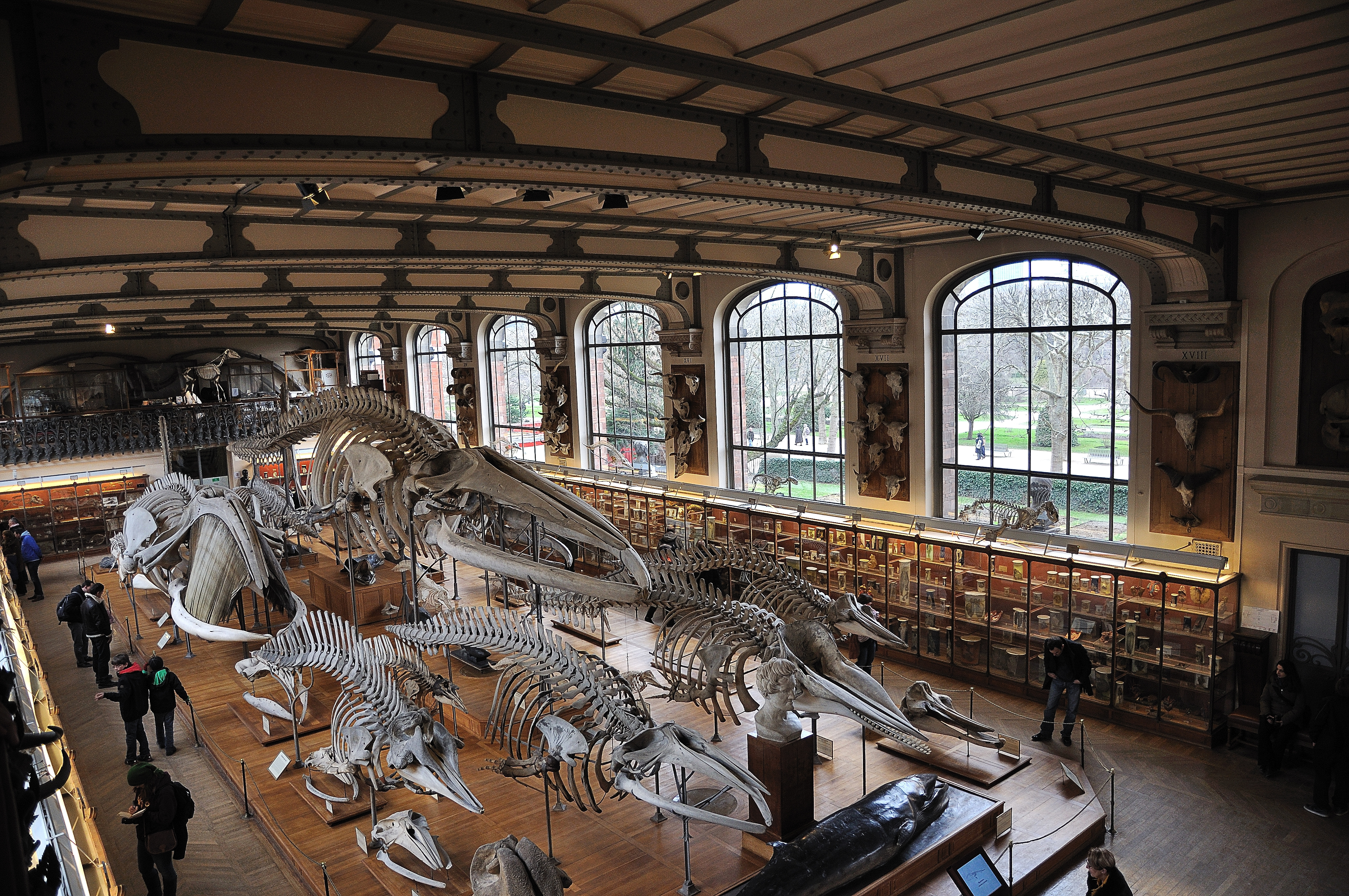 La paléontologie est la discipline scientifique qui étudie les restes fossiles des êtres vivants du passé et les implications évolutives de ces études.